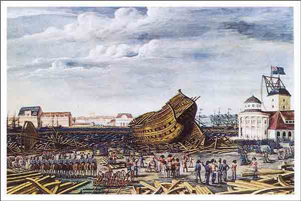 Til højre mastekranen og udkigspavillonen. Kopi efter Eckersberg Englændernes sidste skændselsdåd. Gouache af I. H. S.""